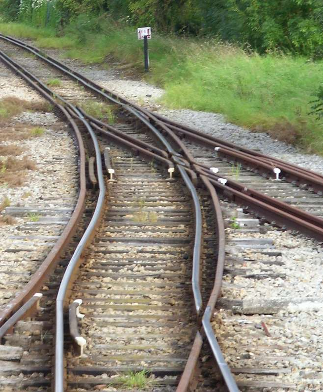 Weiche in einem Vierschienengleis